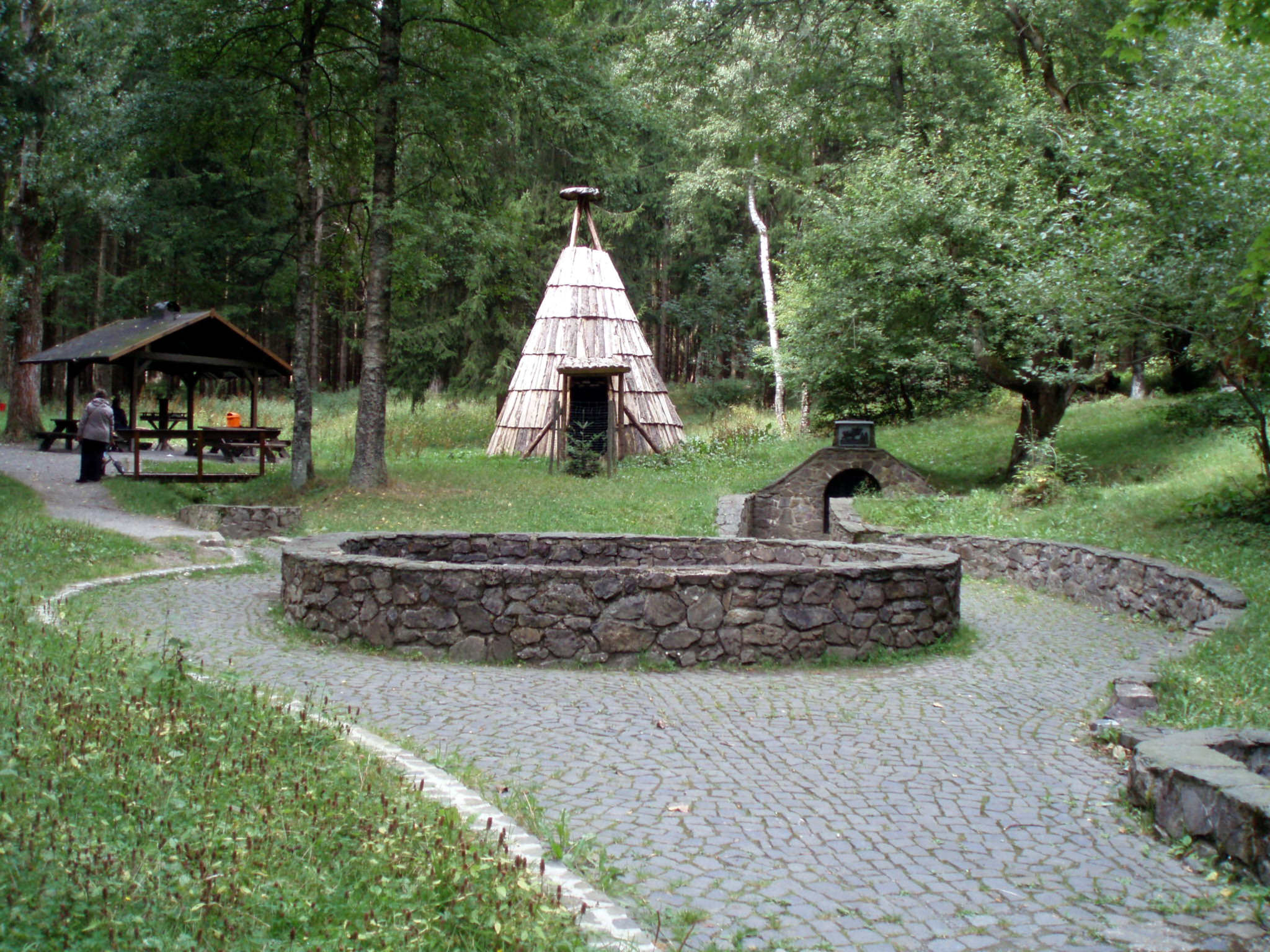 Am Hirschbrunnen bei Elbingerode (Harz)